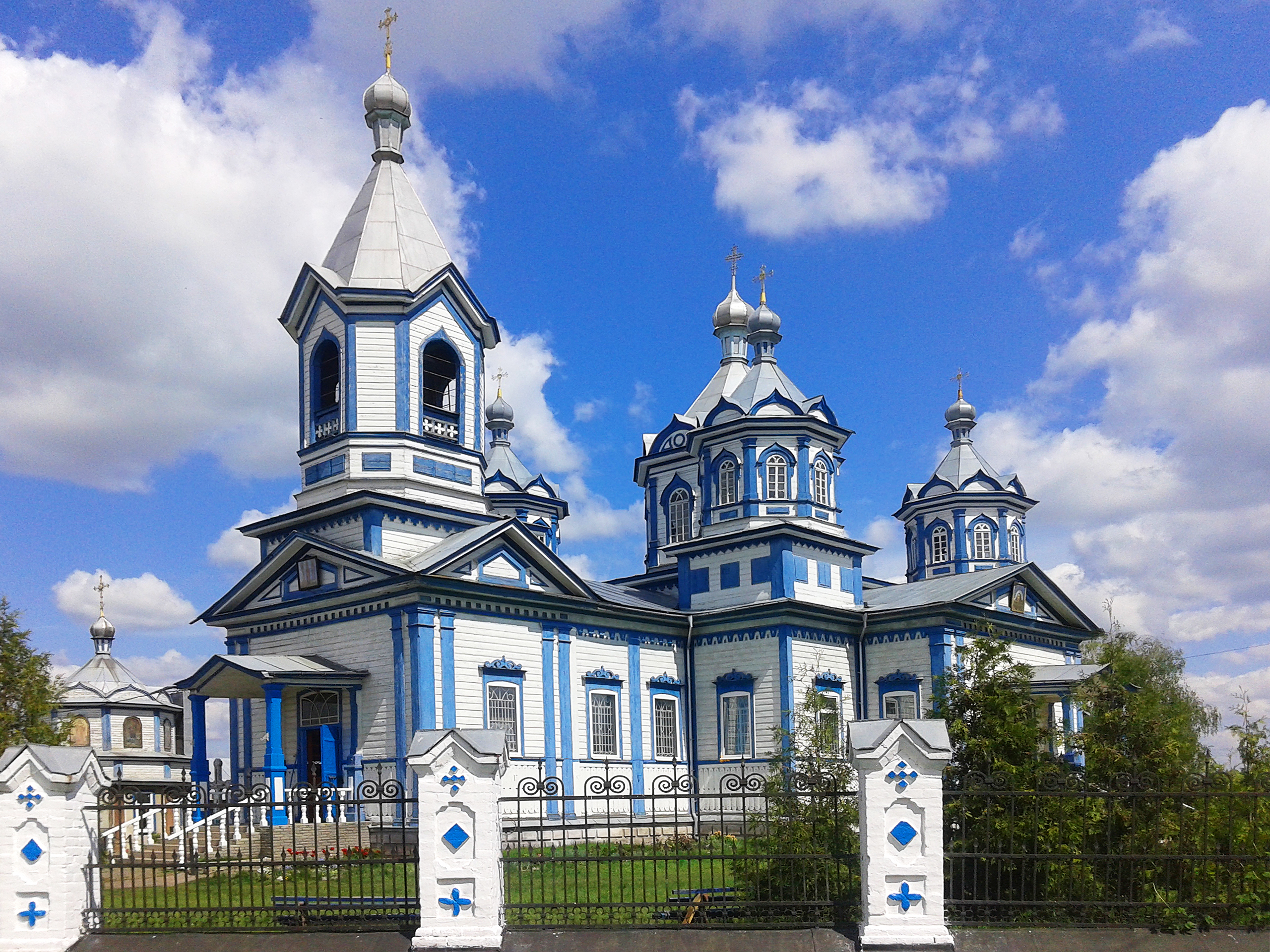 Трьохсвятительська церква на Кустівцях (Прилуки)